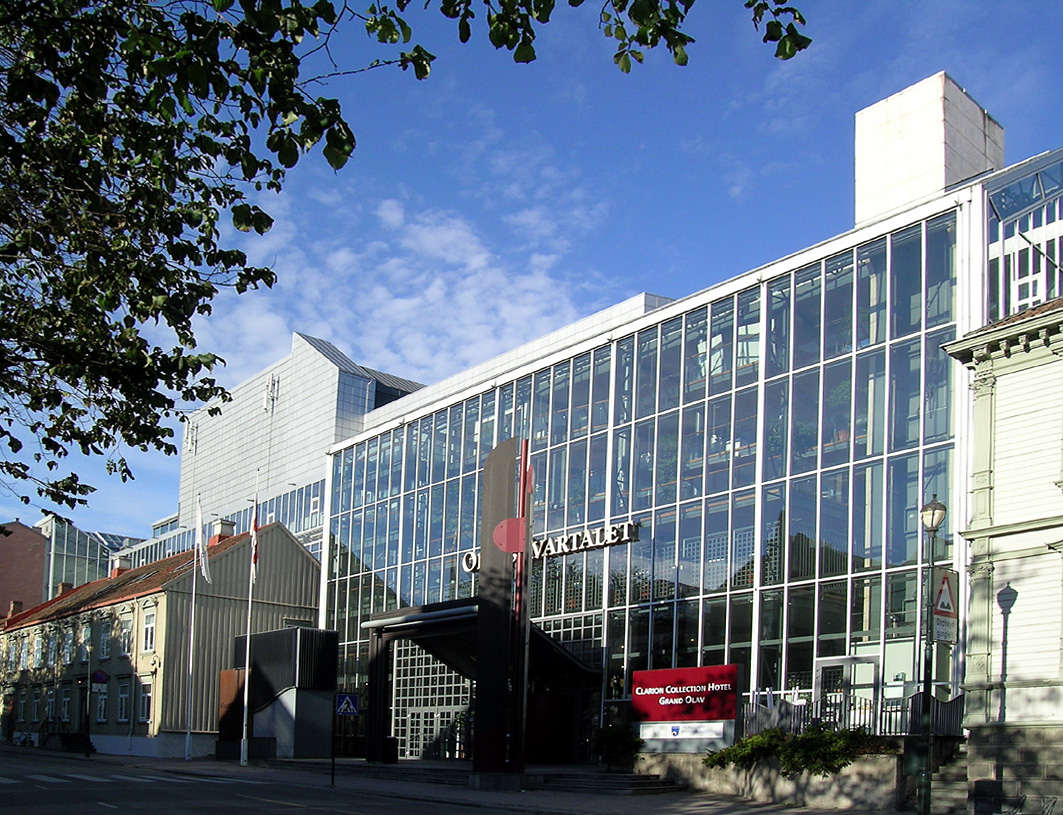 Olavskvartalet, Trondheim. Built 1989. Architects: Per Knudsen Arkitektkontor and Svein Wolle.